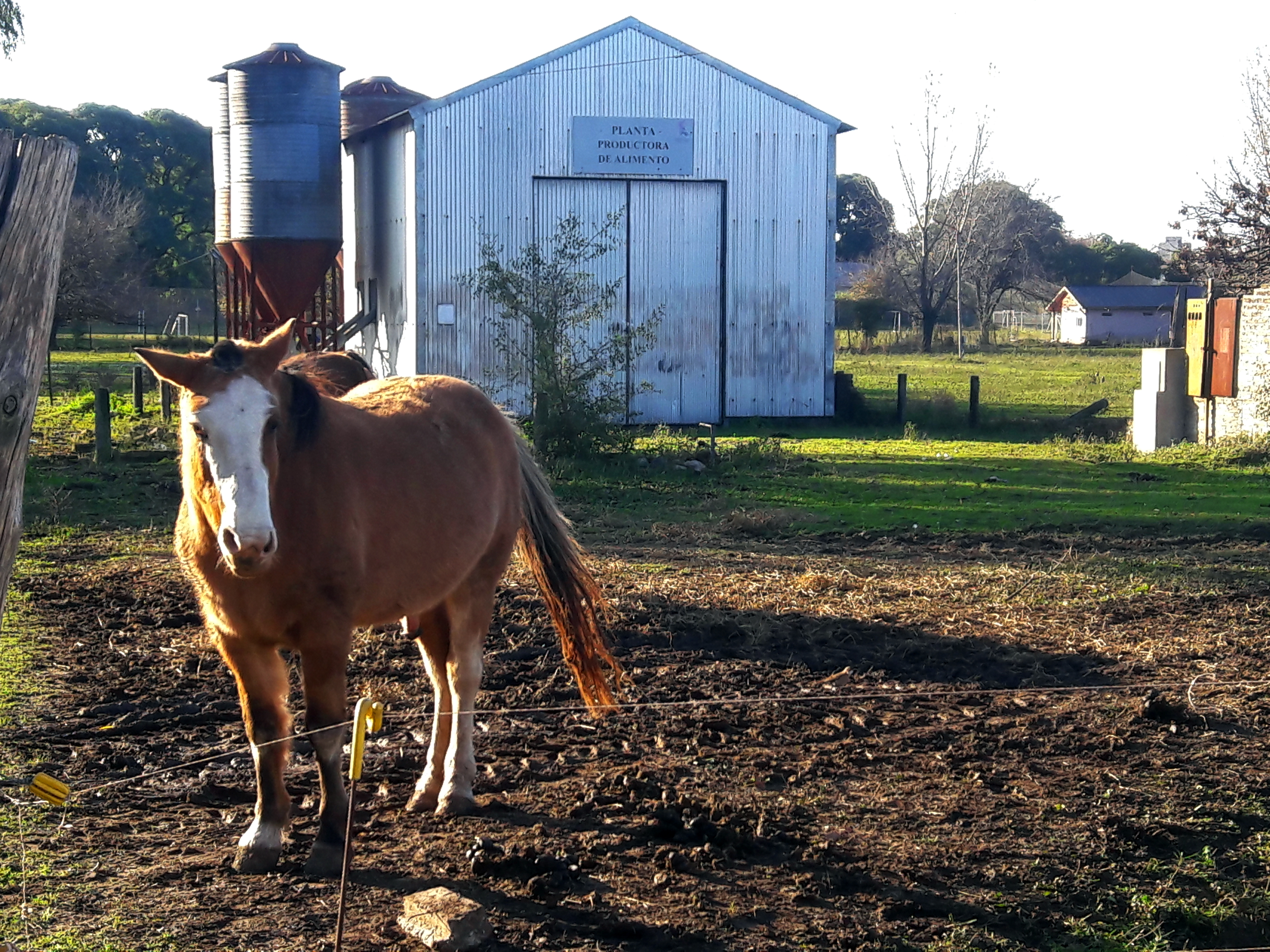 En una tarde otoñal